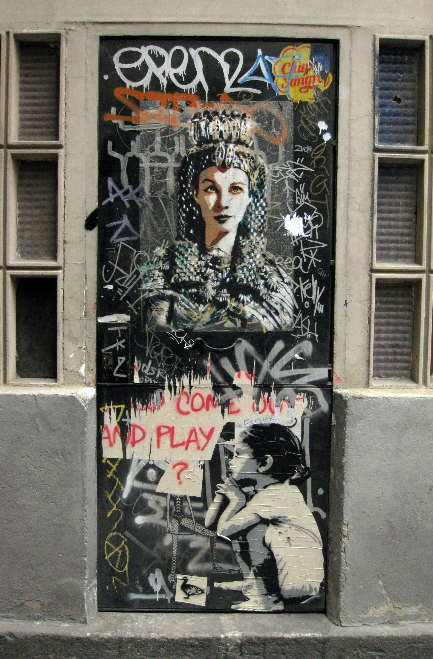 Porta plena de grafits al carrer d'Ataülf núm. 3, al barri Gòtic de Barcelona. A dalt, Vivien Leigh com a Cleopatra, obra d'Andrea Michaelsson, del col·lectiu B-toy.